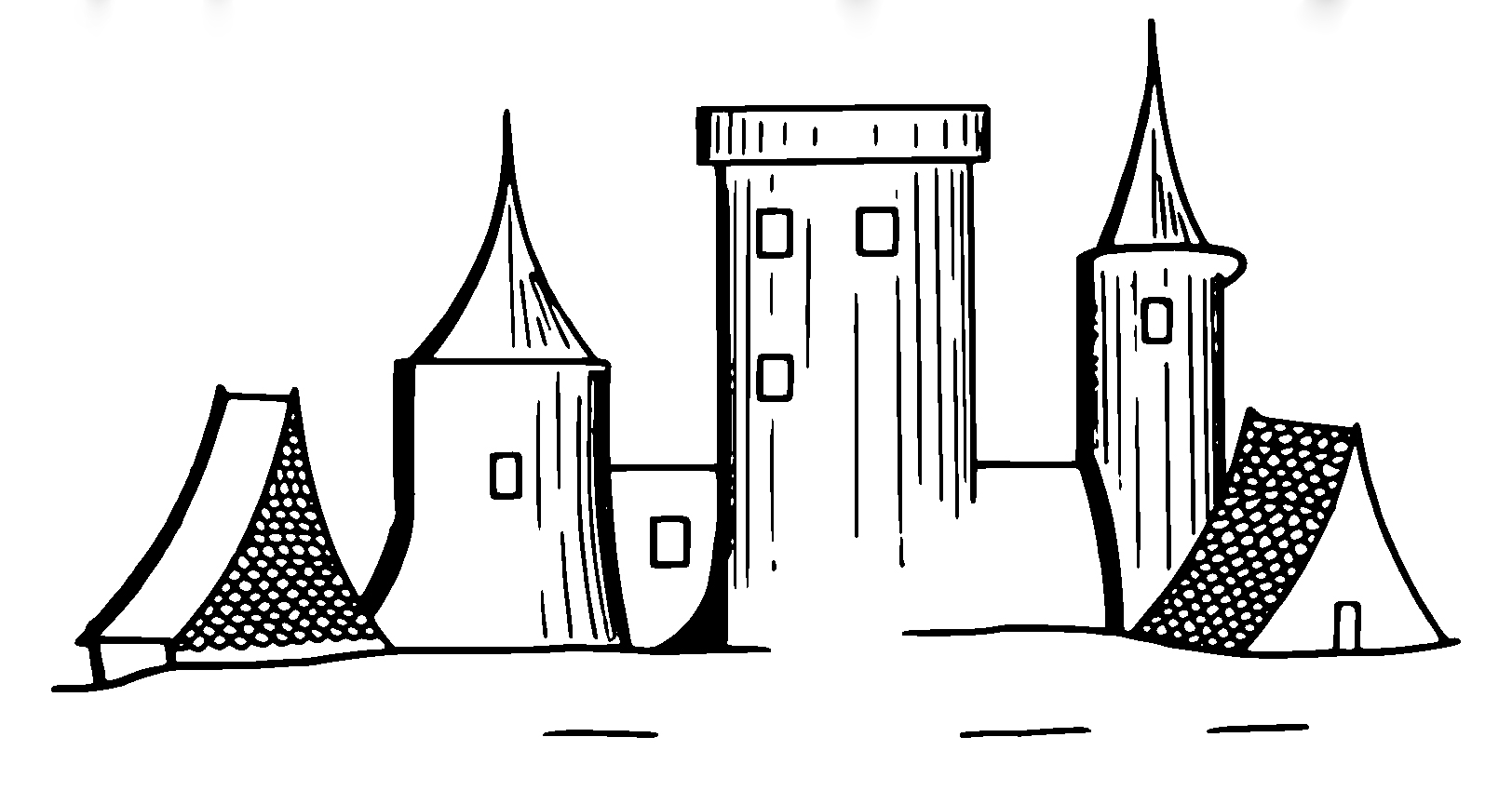 Беларуская (тарашкевіца): Мядзел (Miadzieł). Замак